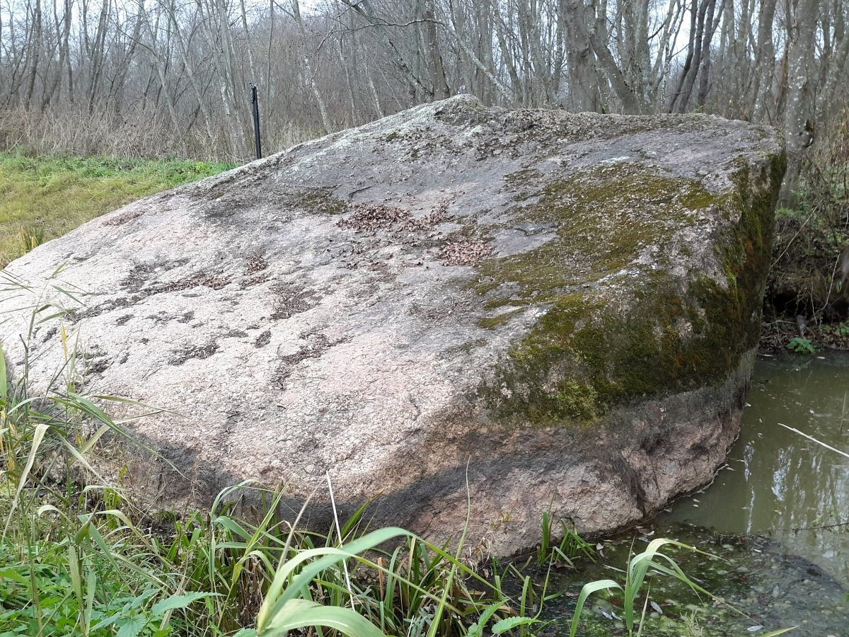 Вароніна. Чортаў камень (Кравец)